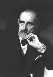 Retrat frontal de Francesc Cambó, fet segurament durant els anys 30